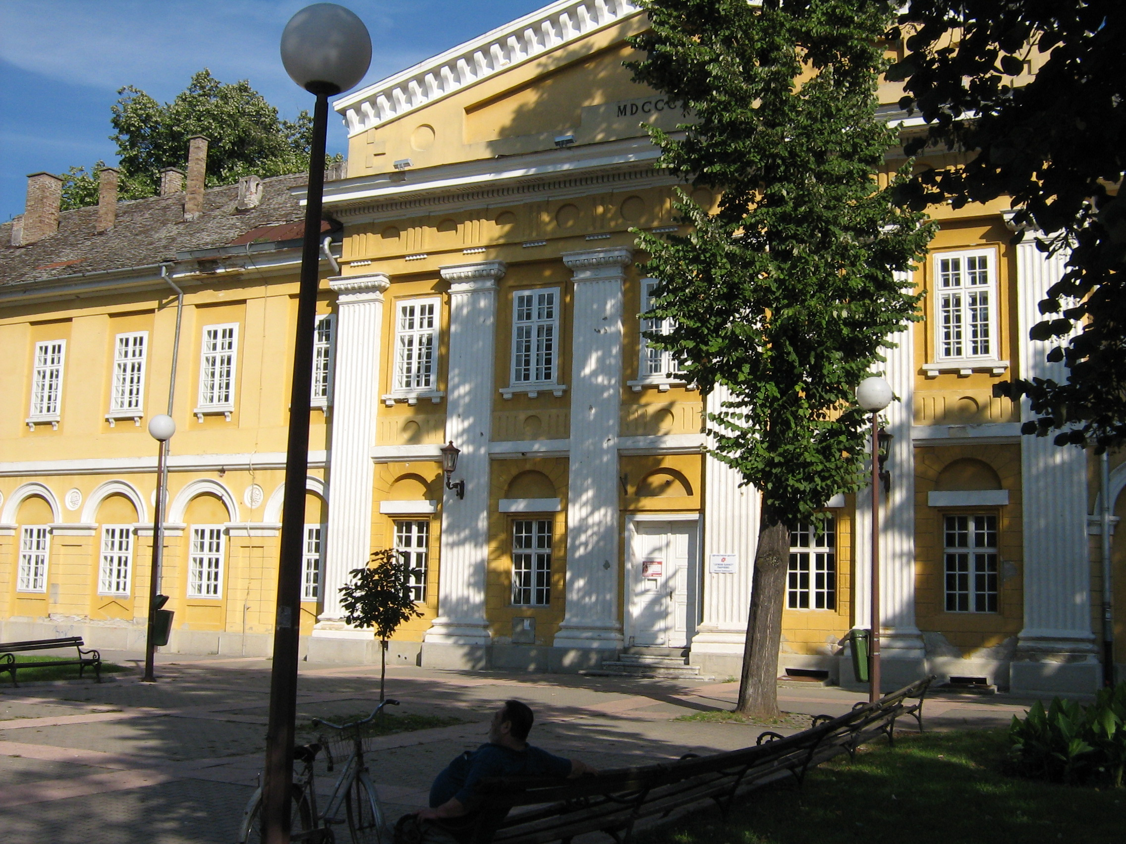 Hospital building in Pančevo/Bolnica u u Pančevu